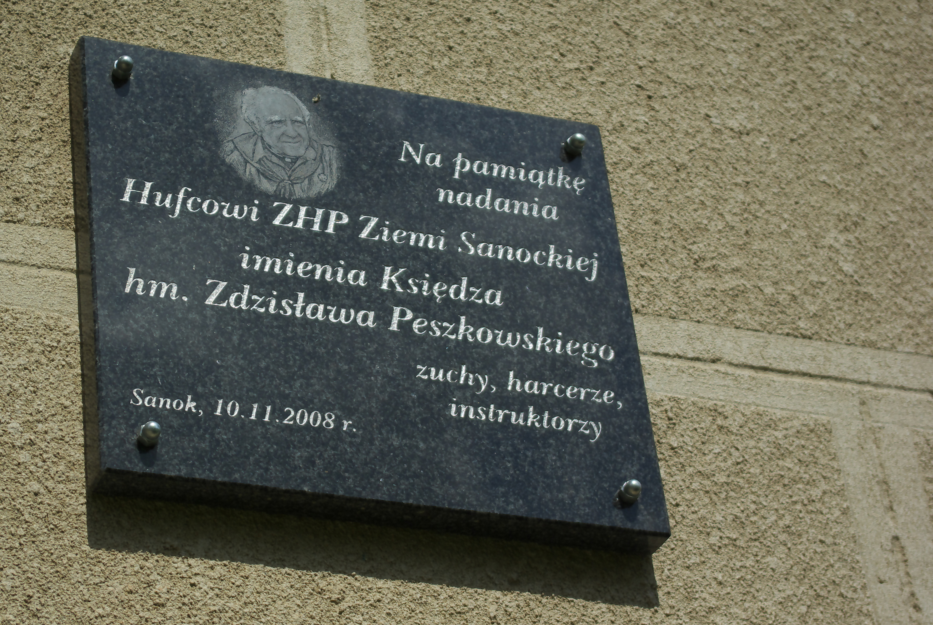 Budynek przy ulicy Zielonej 39 w Sanoku. Tablica pamiątkowa ks. hm Zdzisława Peszkowskiego